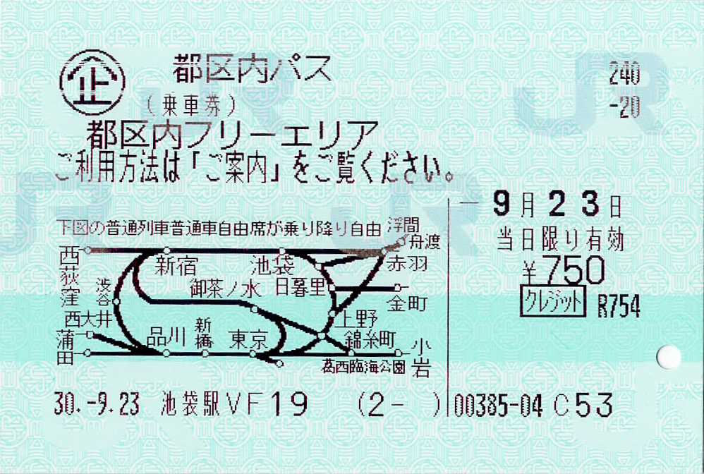 東日本旅客鉄道（JR東日本） 都区内パス 日本語版